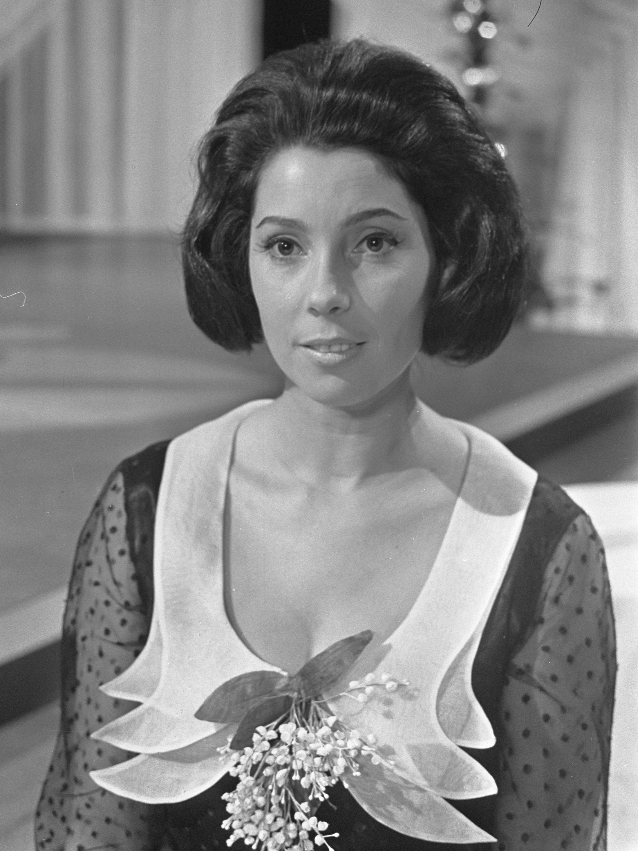 De Corry Brokken show voor tv, Corry Brokken in close-up